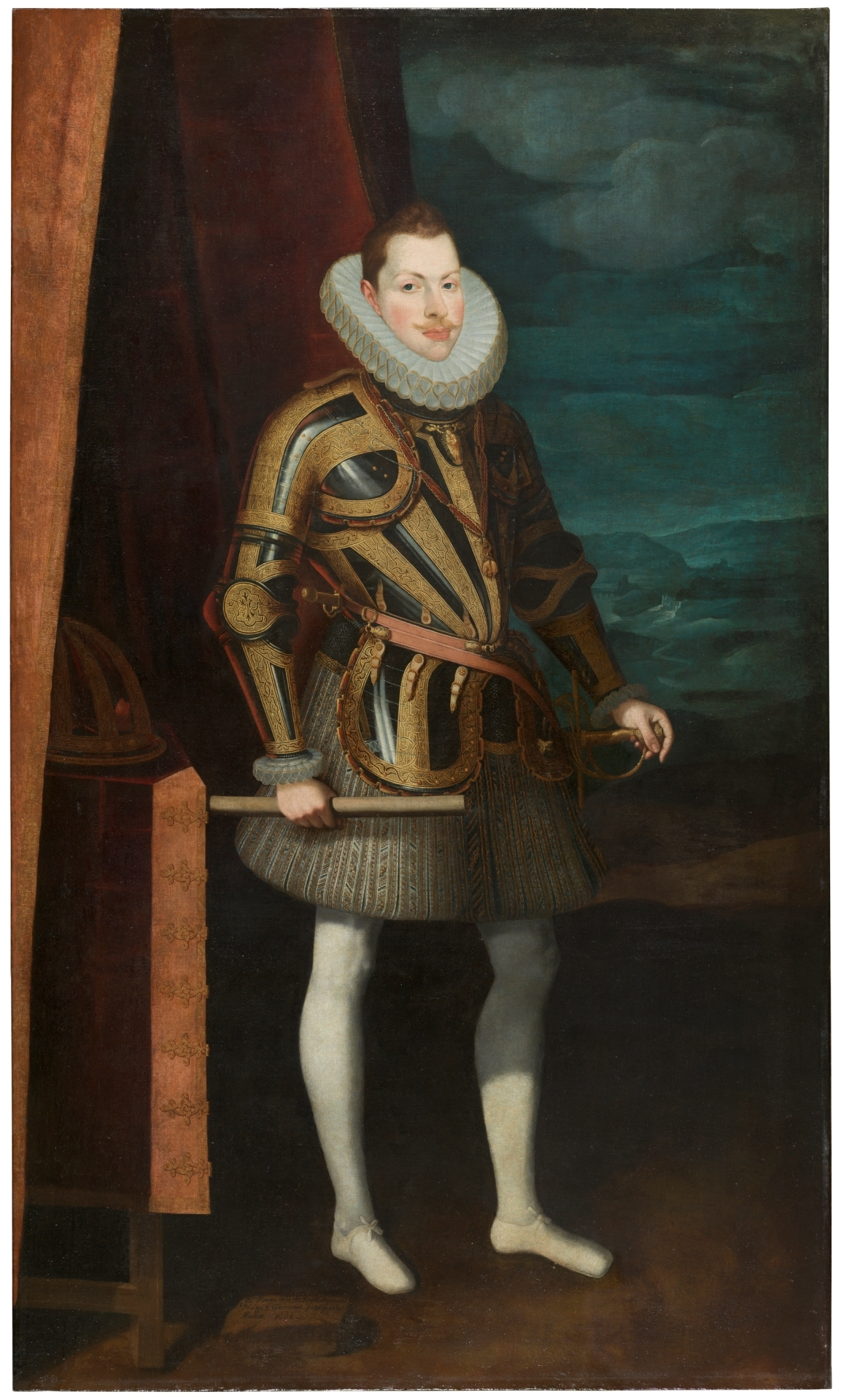 Retrato do rei Felipe III.